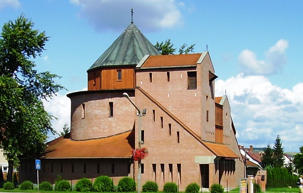 A Szent János apostol és evangélista tiszteletére épült görög katolikus templom Kazincbarcikán található.